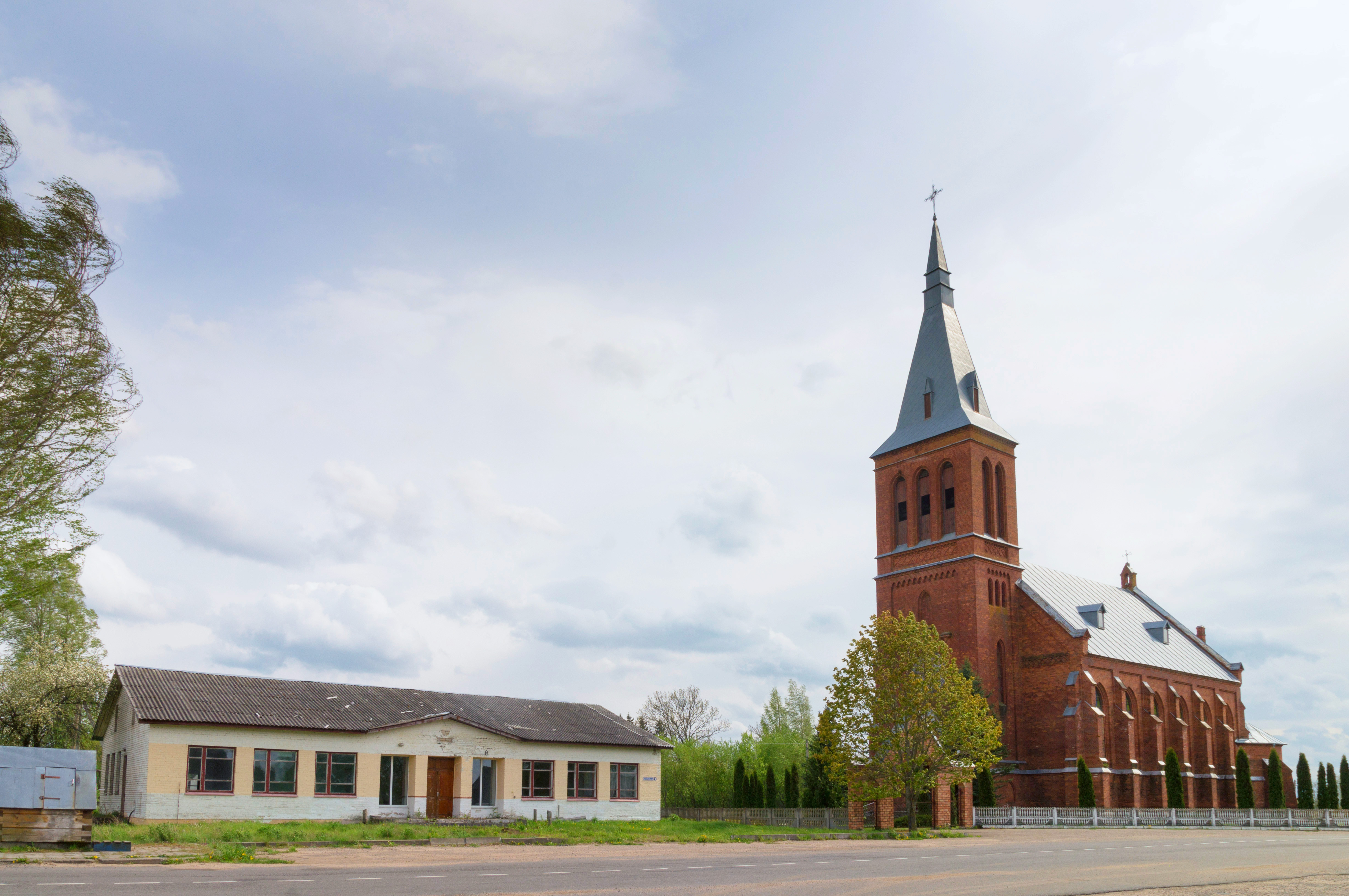 Будынак былой адміністрацыі Альковіцкага сельсавета